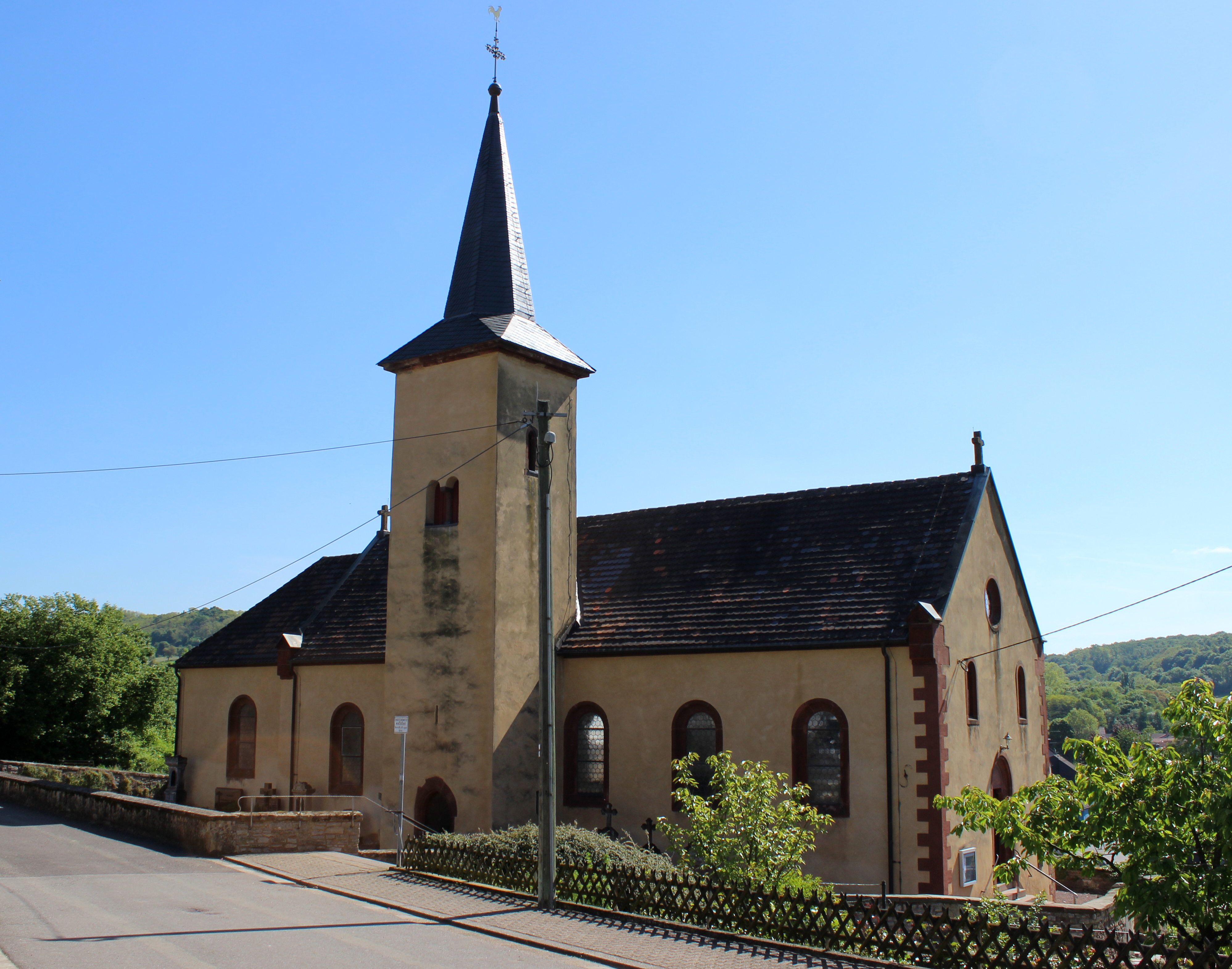 Die katholische Pfarrkirche St. Hubertus in Ihn, einem Ortsteil der Gemeinde Wallerfangen, Landkreis Saarlouis, Saarland